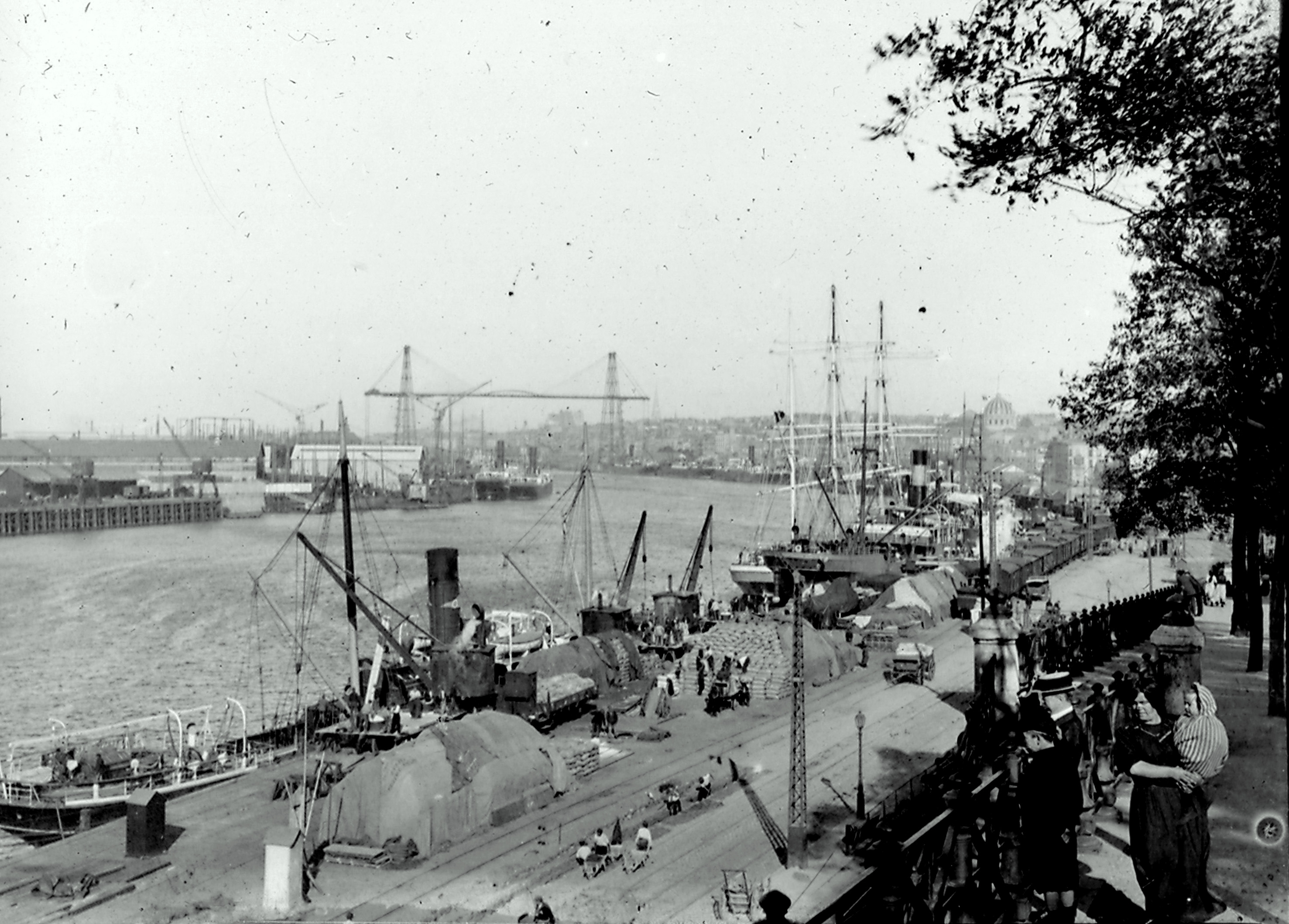 Nantes, la vie sur la Loire en 1912, avec, au loin, le pont transbordeur. Photo prise par mon grand-père Maurice Terrien.